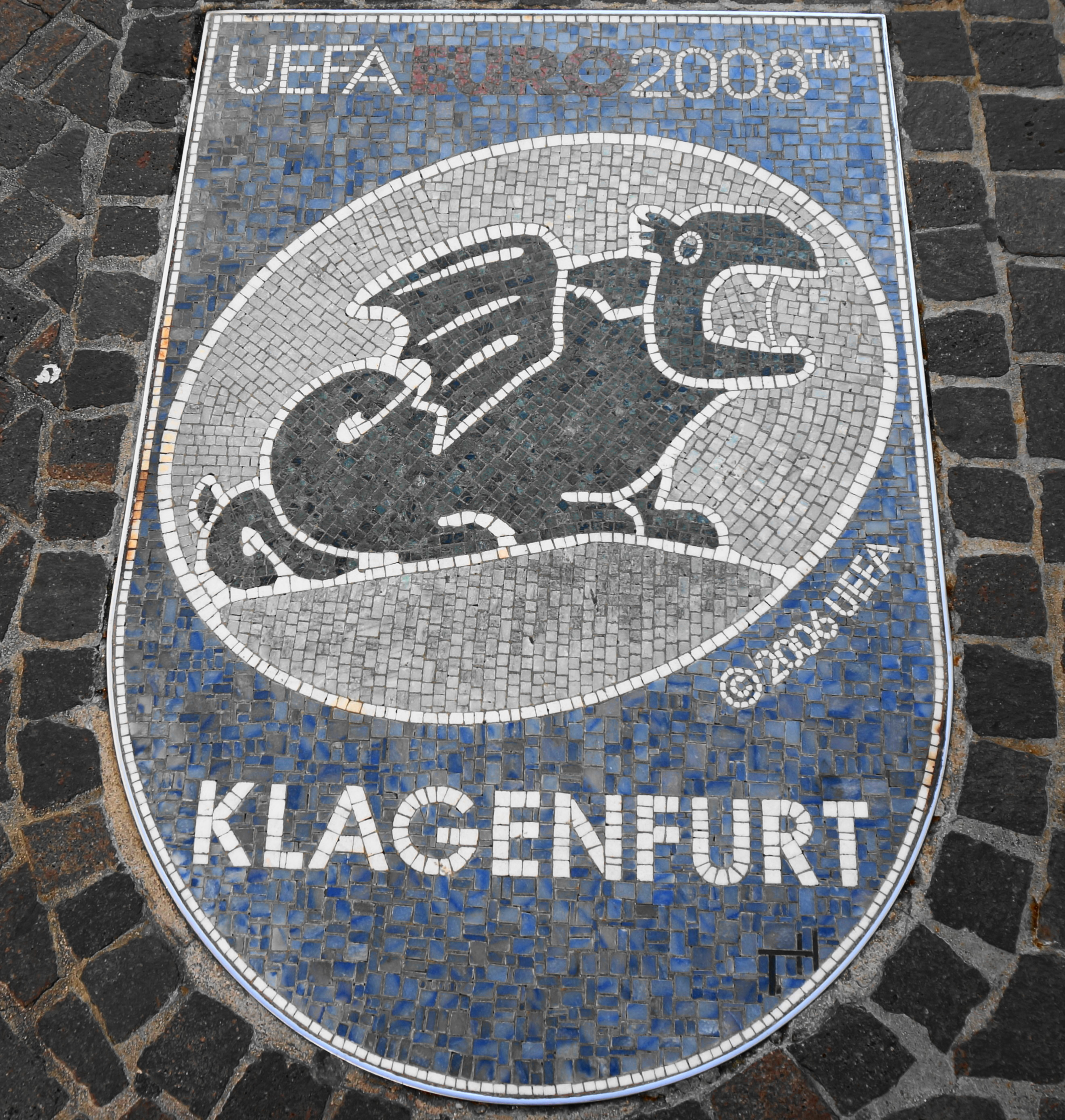 Mosaikwappen anlässlich der Austragung der UEFA EURO 2008 im Fussball Stadion in Klagenfurt am Wörthersee, Kärnten, Österreich, EU